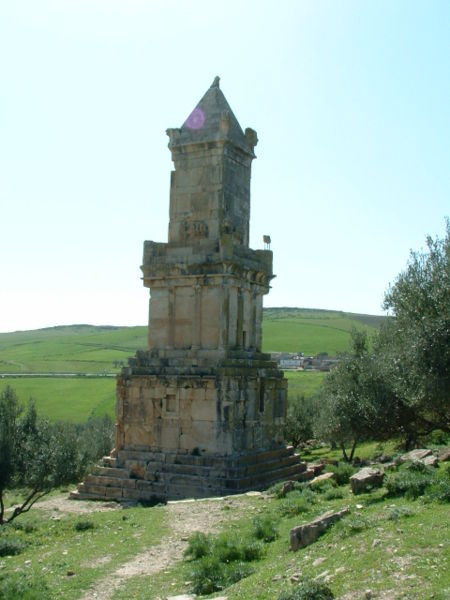 Photographie personnelle (Asram) du mausolée libyco-punique du site de Dougga (Tunisie)